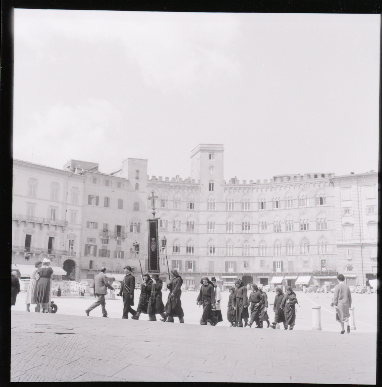 Siena. Processione in Piazza del Campo. Servizio fotografico : Siena, 1965 / Paolo Monti. - Buste: 5, Fototipi: 5 : Negativo b/n, gelatina bromuro d'argento/ pellicola ; 6x6. - ((Serie costituita da 1 negativo identificato con il n.: 11046bis. La suddetta serie è contenuta nella scatola identificata con la numerazione G11001-11500. - Occasione: Documentazione per la pubblicazione: "Emilio CECCHI, Natalino SAPEGNO (a cura di), Storia della Letteratura Italiana, 9 voll., Milano, Garzanti, 1966 e segg.". - Fonte: Rubrica di Paolo Monti: Monti/ Paesaggi - Luoghi d'arte architettura e scultura antica - pitture - affreschi (1963-1976), presso Archivio Paolo Monti